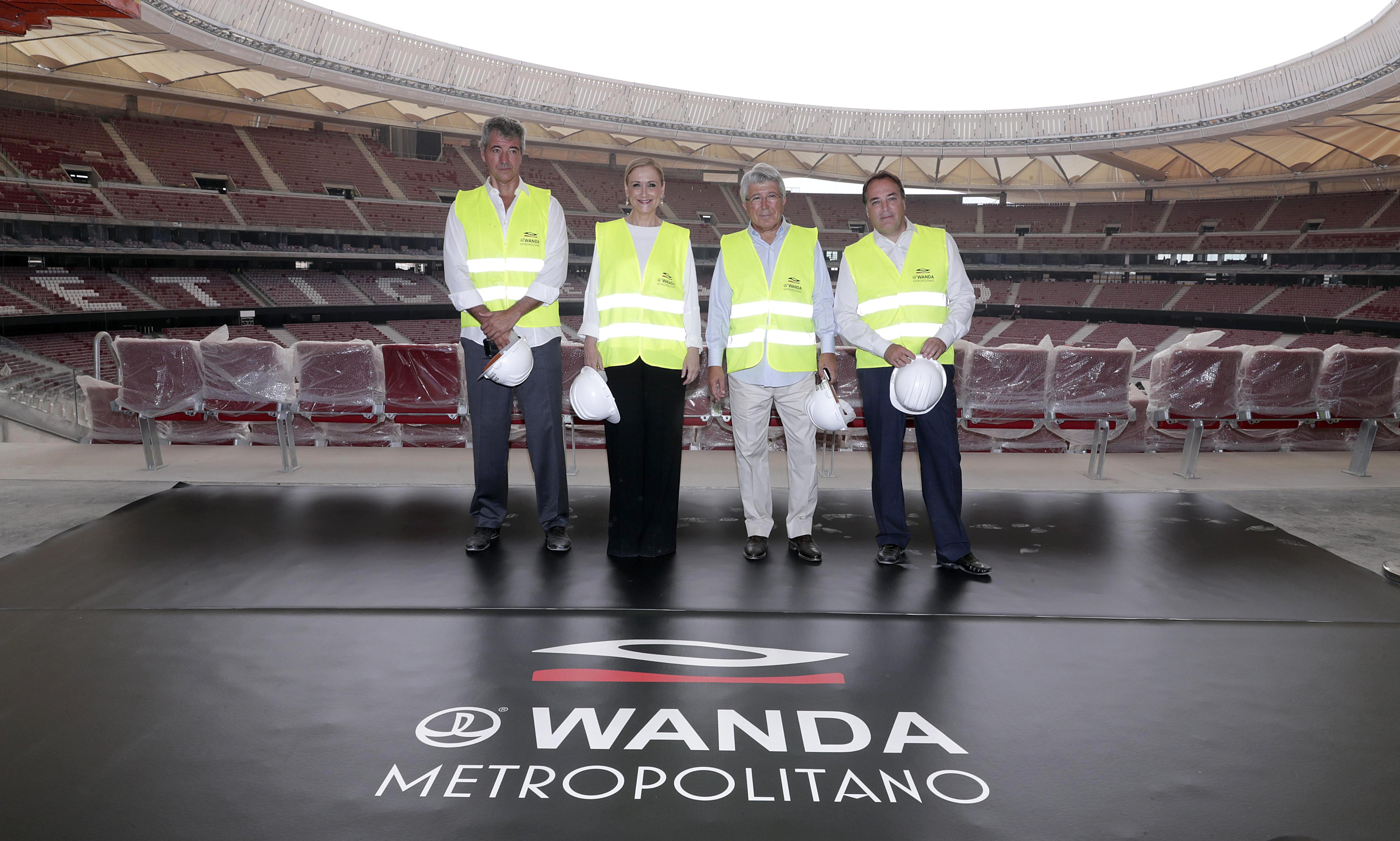 La presidenta de la Comunidad, Cristina Cifuentes, acompañada del presidente del Atlético de Madrid, Enrique Cerezo, ha visitado las obras del nuevo estadio del Atlético de Madrid, que se inaugurará el 16 de septiembre